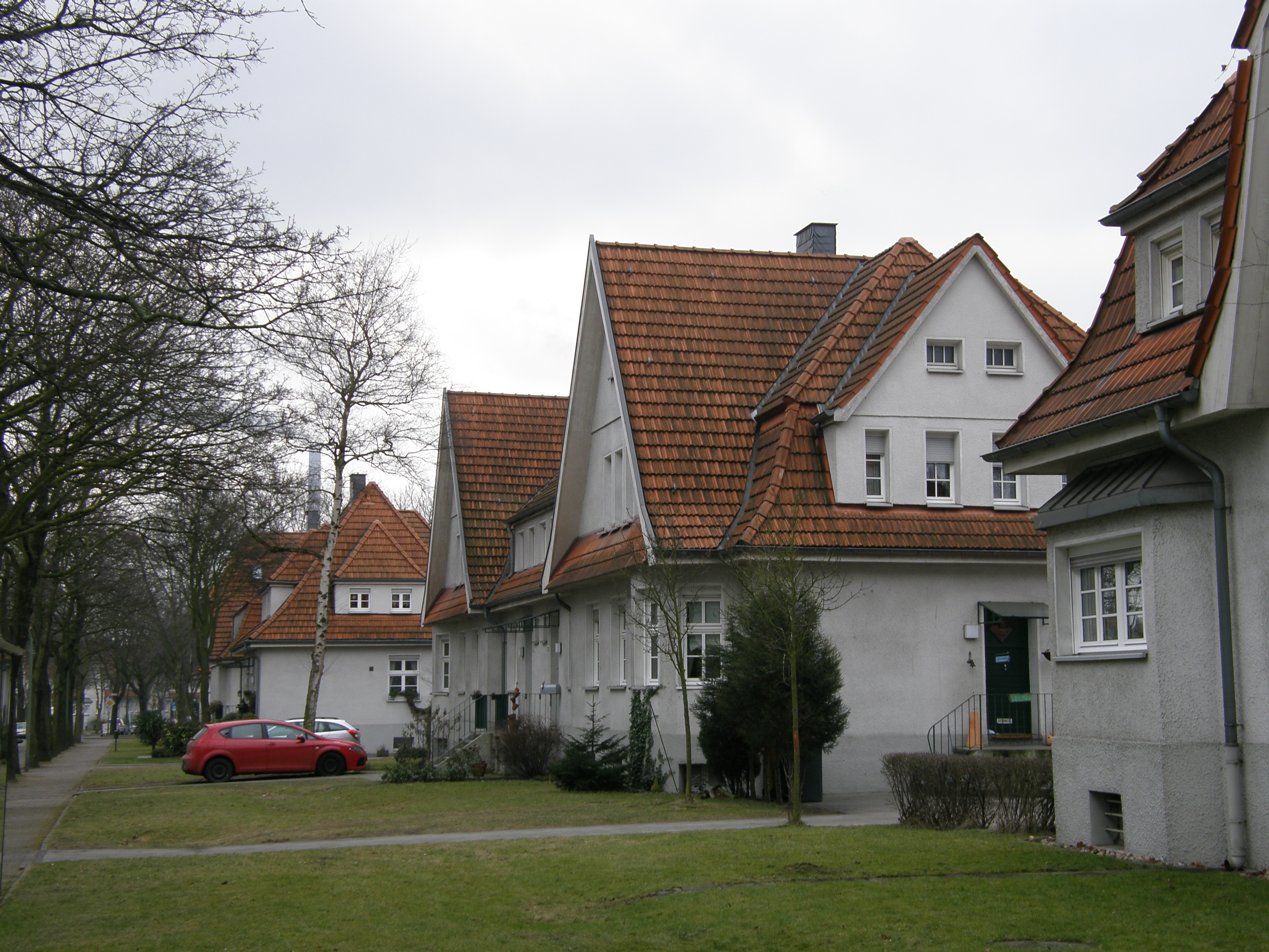 Gartenstadt Welheim in Bottrop. Häuserreihe mit offenen Vorgärten